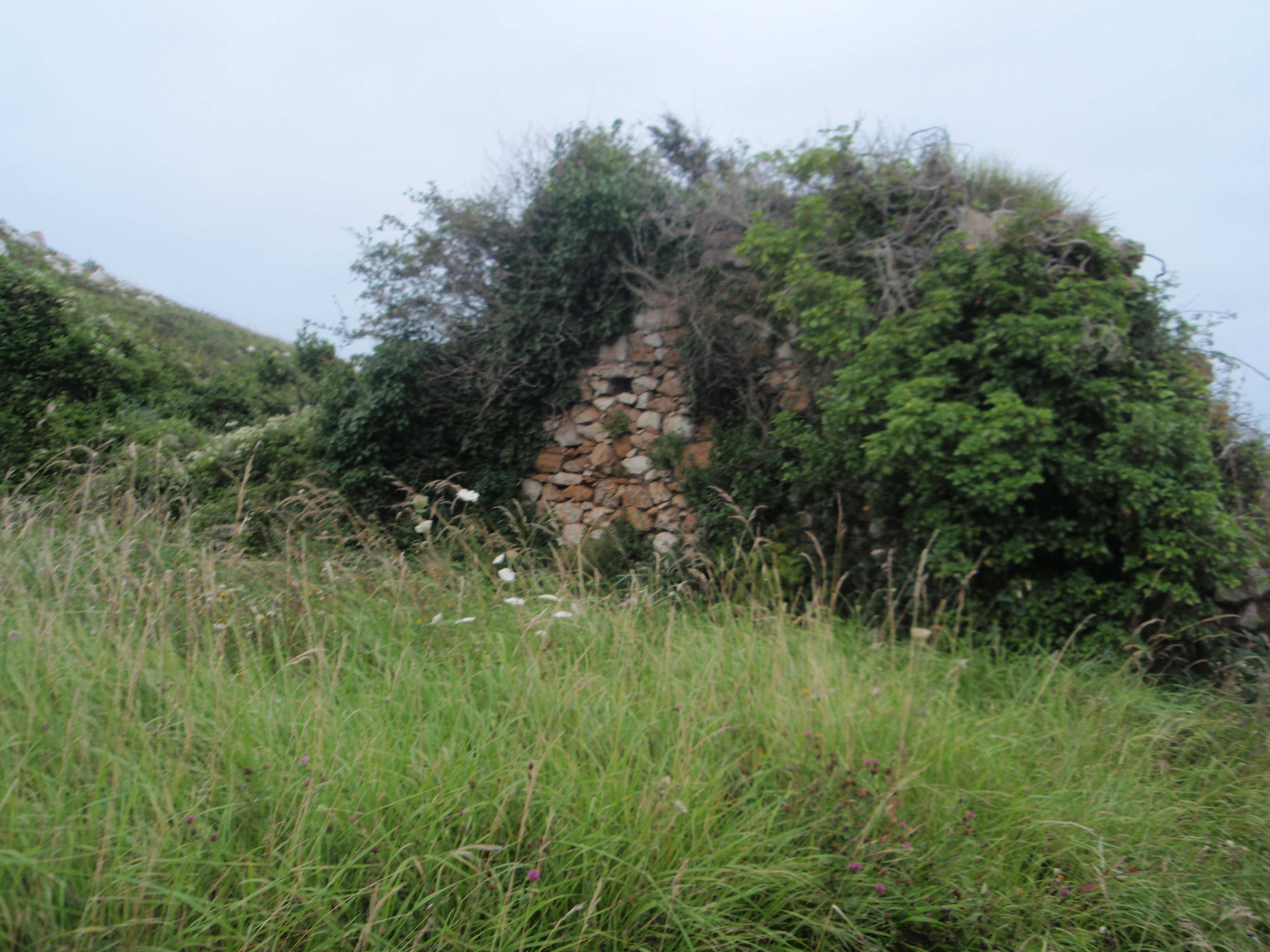 Restos de un edificio en Morteo, Cantabria.